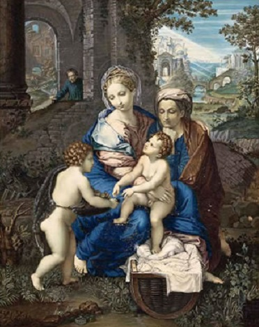 "Sacra Famiglia", miniatura da Raffaello